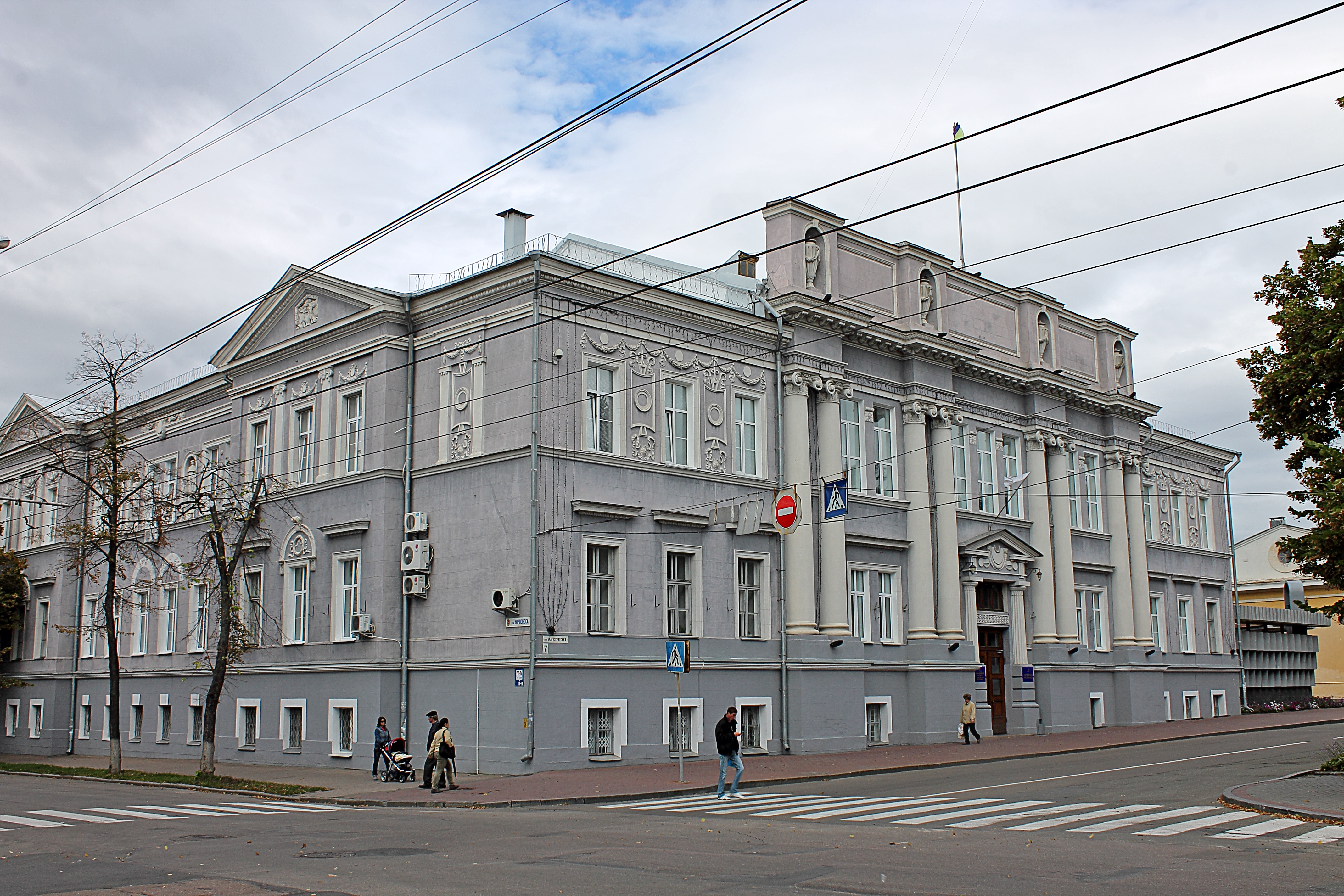 Державний банк, Чернігів, вул. Магістратська, 7